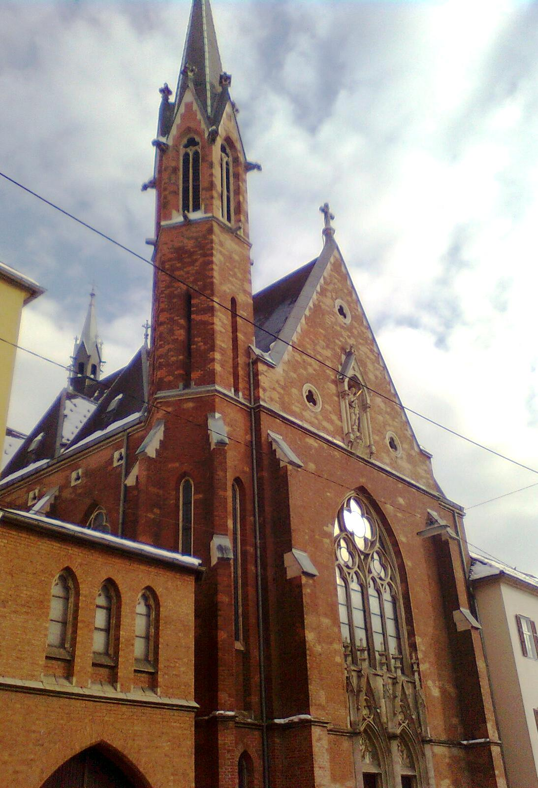 Grazer Lazaristen- oder Marienkirche zur Schmerzhaften Mutter im Stadtbezirk Lend